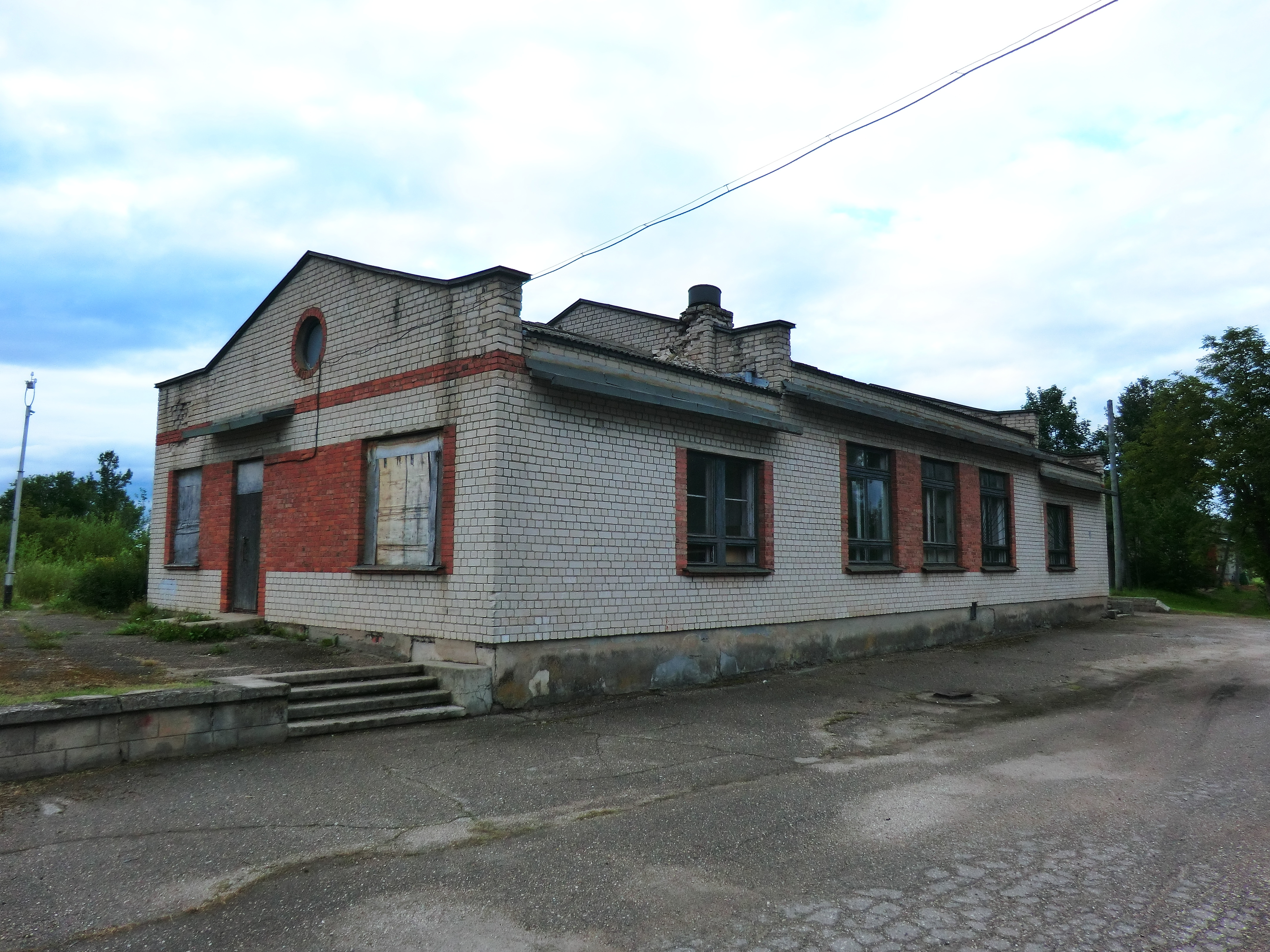 Здание закрытой ст. Балви (2)